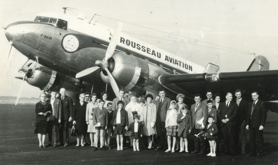 Le DC3 de Rousseau aviation avant le départ pour les îles anglo-normande, avec le personnel/ passagers